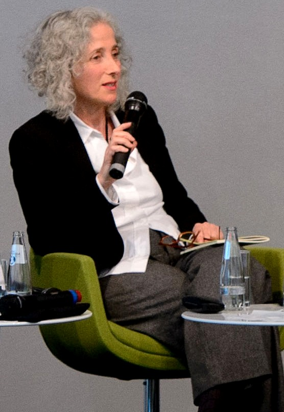 Michael Wolffsohn (Historiker und em. Prof. f. neuere Geschichte, Univ. d. Bundeswehr), Yfaat Weiss (Prof.f. jüdische Geschichte; Leiterin Franz Rosenzweig Minerva Research Centers, Hebräische Universität), Joschka Fischer (Publizist; ehem. Außenminister, Berlin) Yehuda Bauer (Historiker und emeritierter Professor für Holocaust-Studien an der Hebräischen Universität), Moderation: Ralf Fücks (Vorstand, Heinrich-Böll-Stiftung), Foto